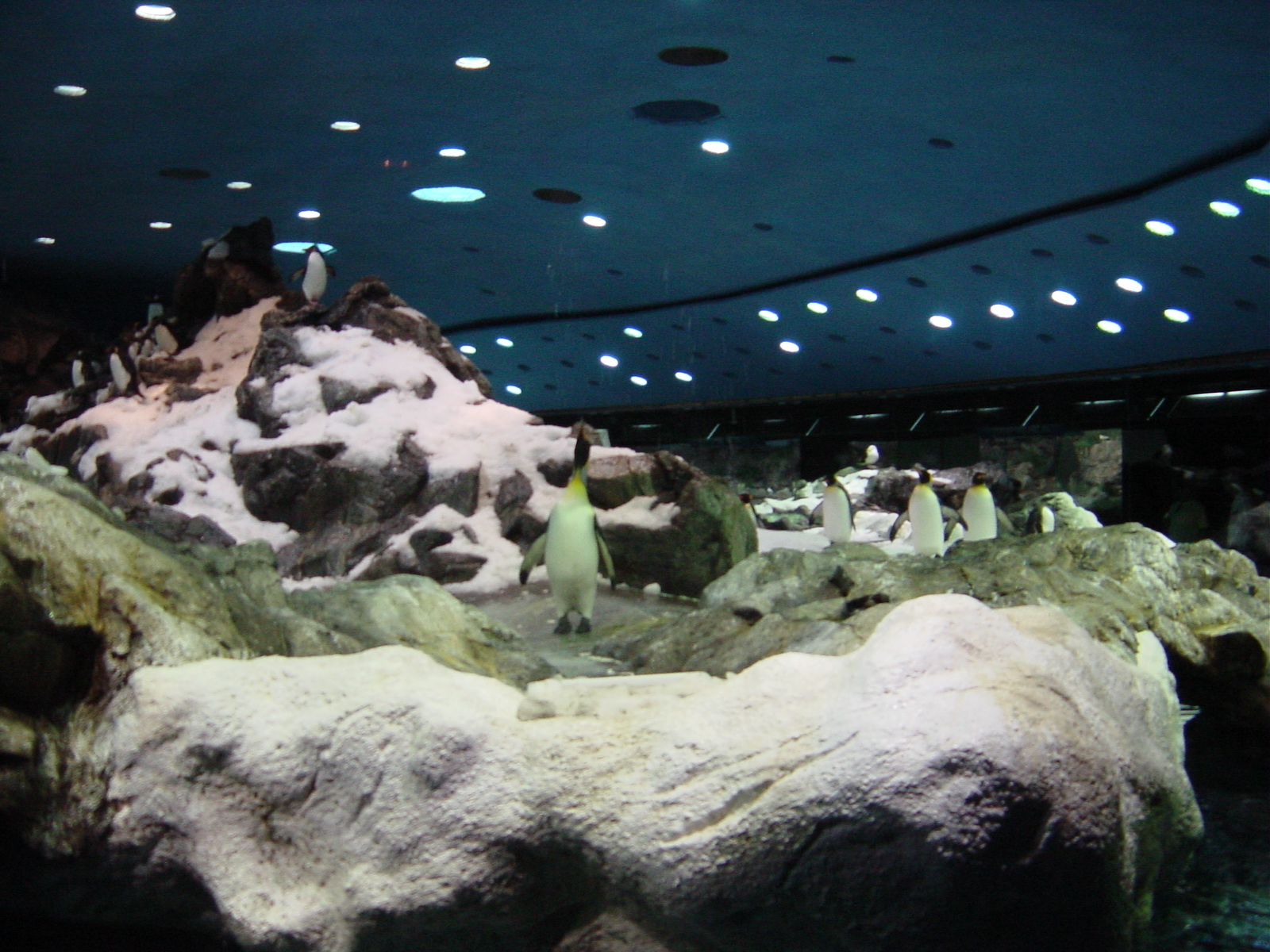 Pinguinarium im Loro Parque